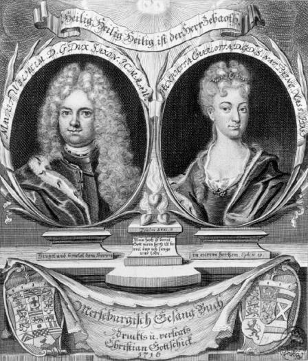 Moritz Wilhelm, Herzog von Sachsen-Merseburg (1688-1731) und seine Gemahlin Henriette Charlotte von Nassau-Idstein (1693-1734)